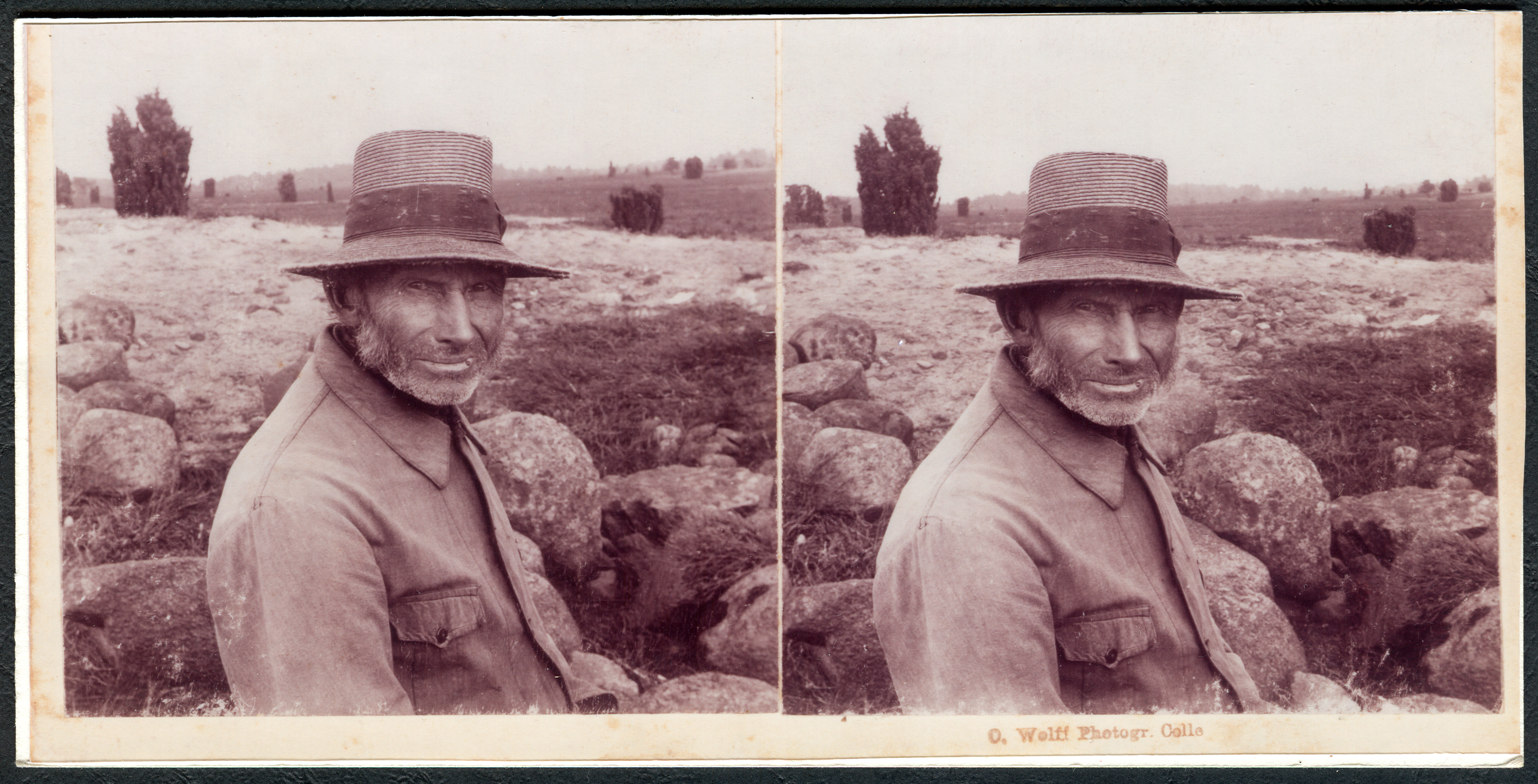 Bildseite der 1912 von dem Celler Fotografen Otto Wolff gefertigten Aufnahme aus der Lüneburger Heide. Diese handgefertigte Kopie einer Stereoskopie, ist rückseitig handschriftlich betitelt "Ein alter Heidjer (Springhorn aus Wilsede. Das Dokument wurde freundlicherweise zur Verfügung gestellt von der Fotografin Ilse Paul, um es als Digitalisat über Wikimedia Commons nachhaltig allen Menschen zur Verfügung zu stellen ...